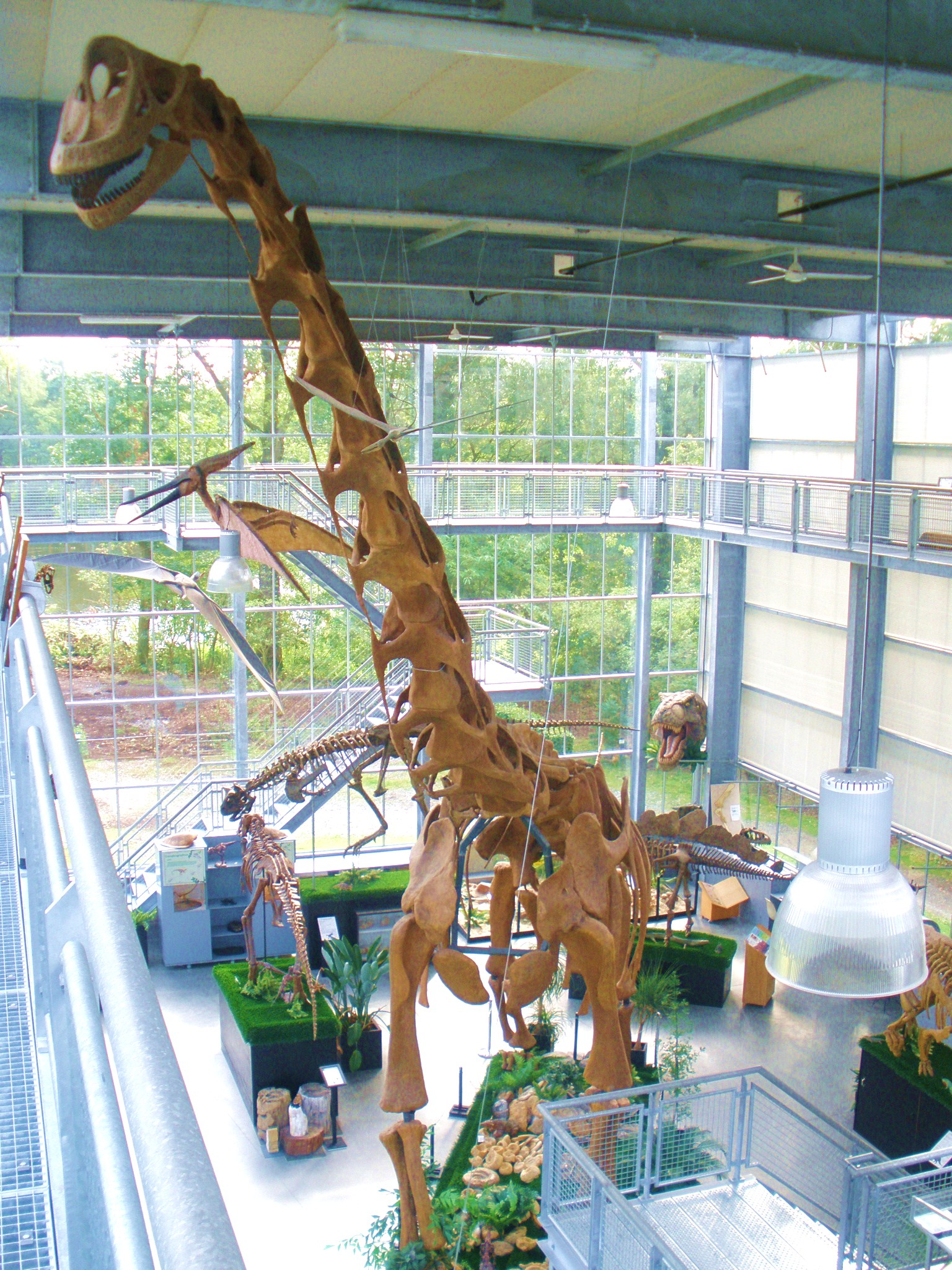 Fossil of Giraffatitan, an extinct sauropod- Took the photo at De Groene Poort, Boxtel